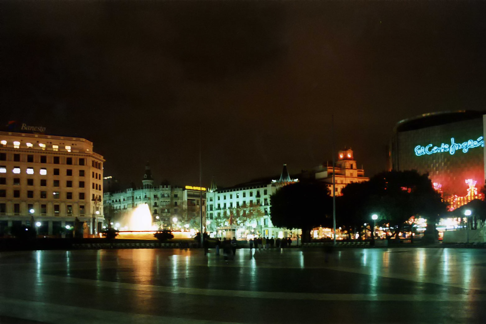 Barcelona, Plaça de Catalunya